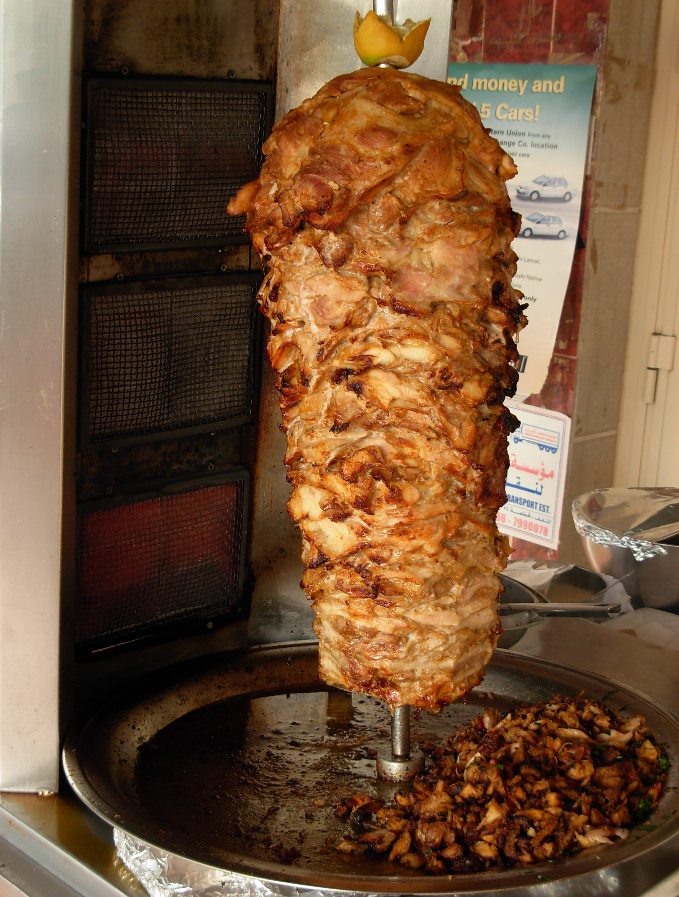 ഷവർമ്മ